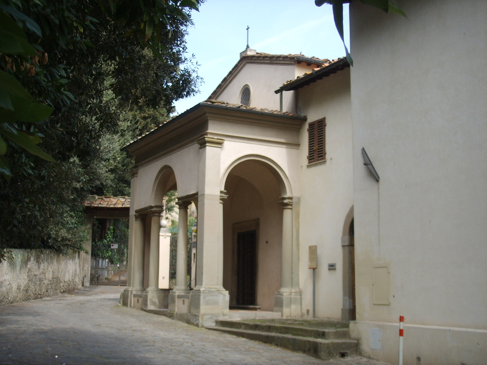 Maria a Coverciano, chiesa vecchia